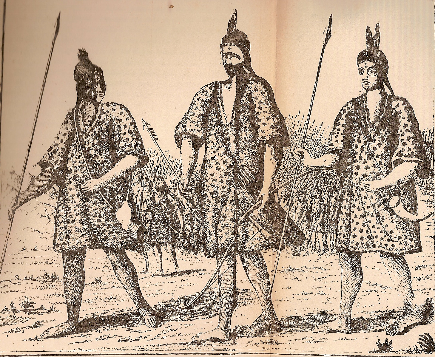 阿比坡呢族狩獵的服裝